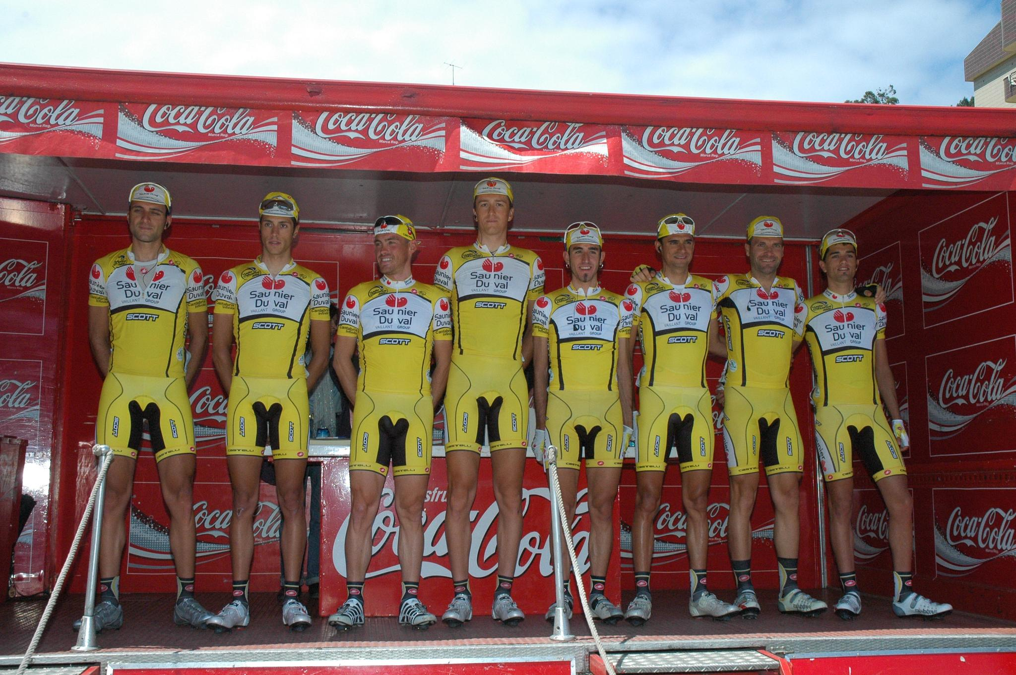 Saunier Duval-Scott, Euskal Bizikleta 2008